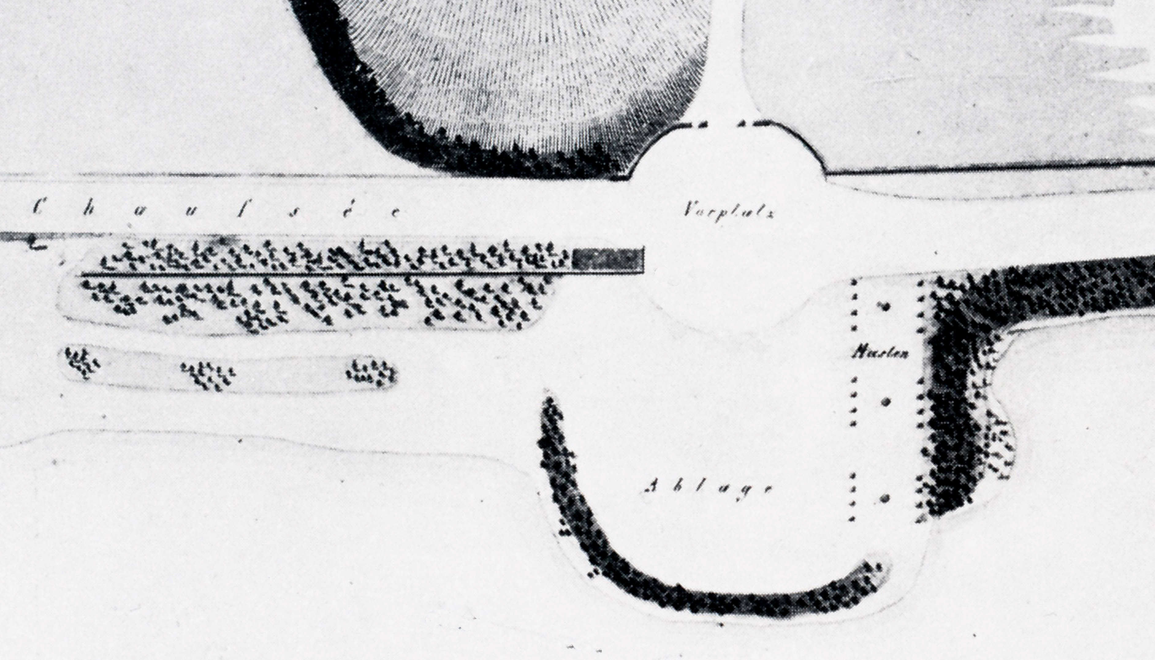 Die "Ablage" am Jungfernsee mit "Masten-" Grundriss und Wassertor